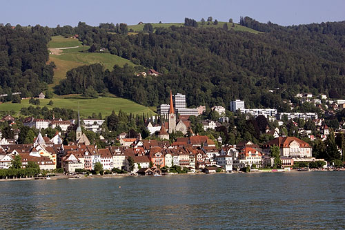 Die Altstadt von Zug vom See her gesehen